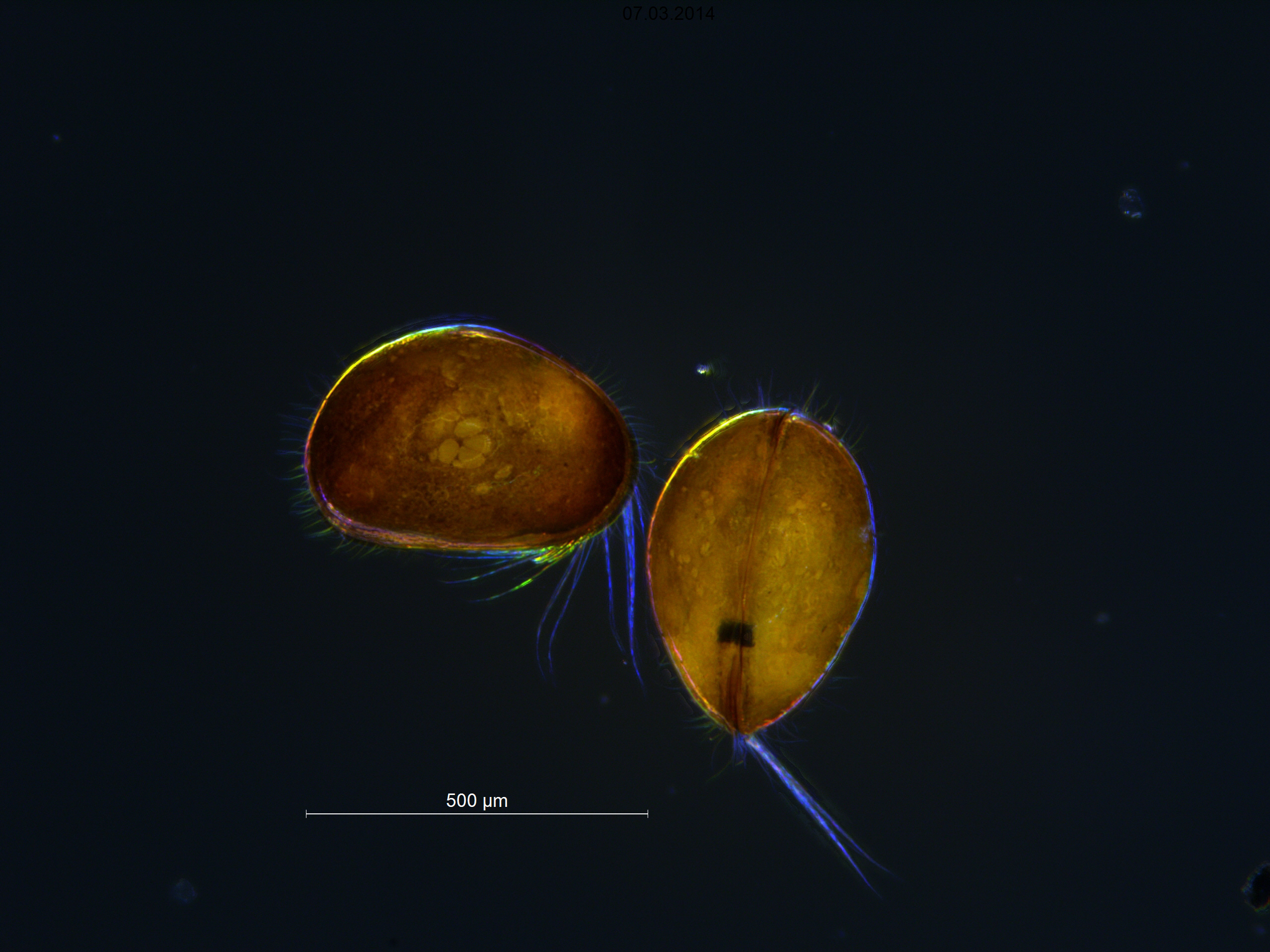 Krepsdyret nøttemuslingkreps (Cyclocypris ovum)